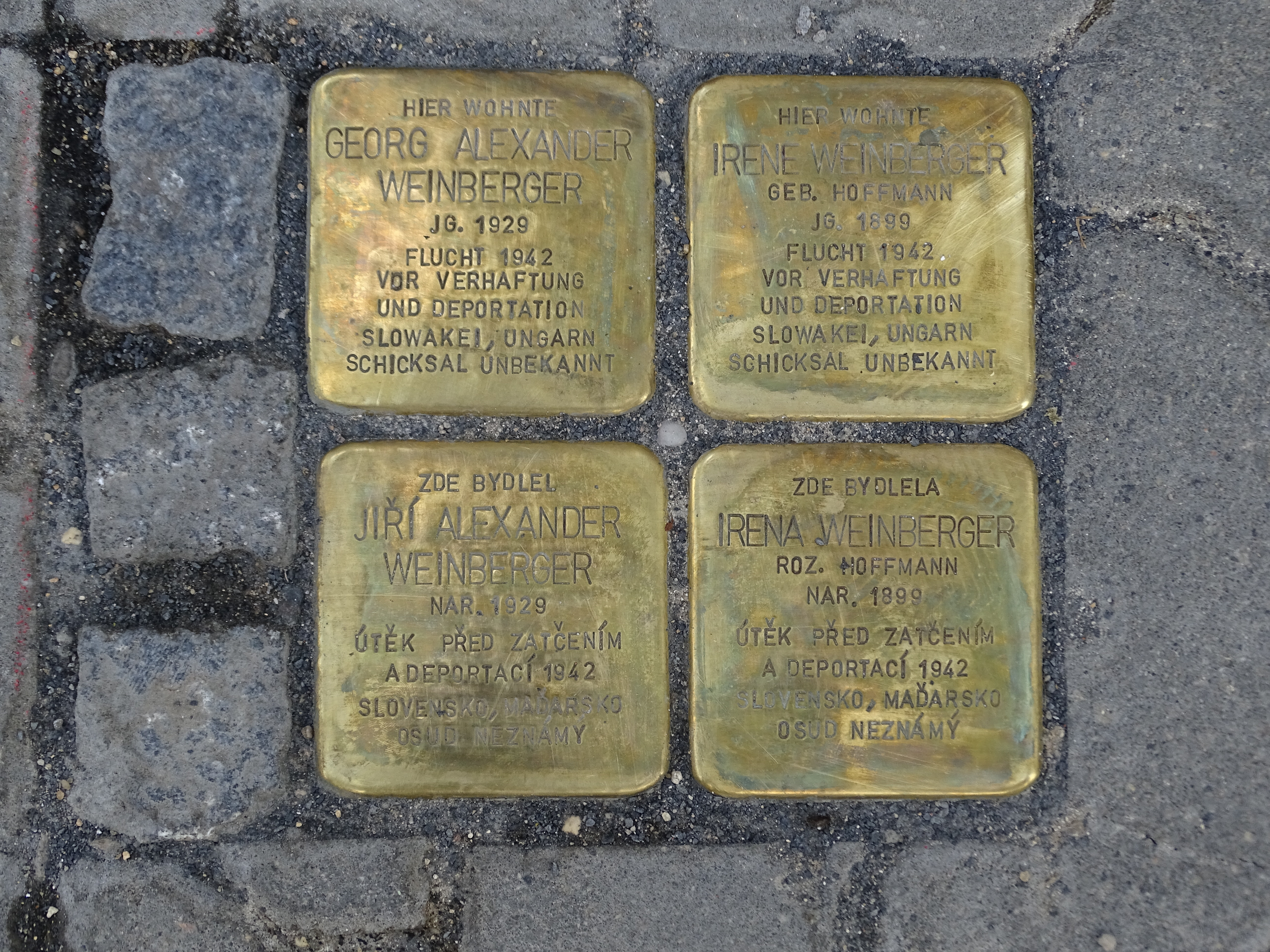 Stolpersteine für die Familie Weinberger, Straße Rudoleckého 859/21, jeweils tschechisch und deutsch, Znojmo (Tschechische Republik); die Nr. 859 wurde für die Familie Weinberger gebaut, die Nr. 860 daneben war als "Weinberger-Villa " bekannt, erbaut für den Sohn Fritz; die abgebildeten Stolpersteine gehören weiteren Angehörigen. Die Steine wurden am 4. August 2016 verlegt [1], zwei Tage vor dieser Aufnahme